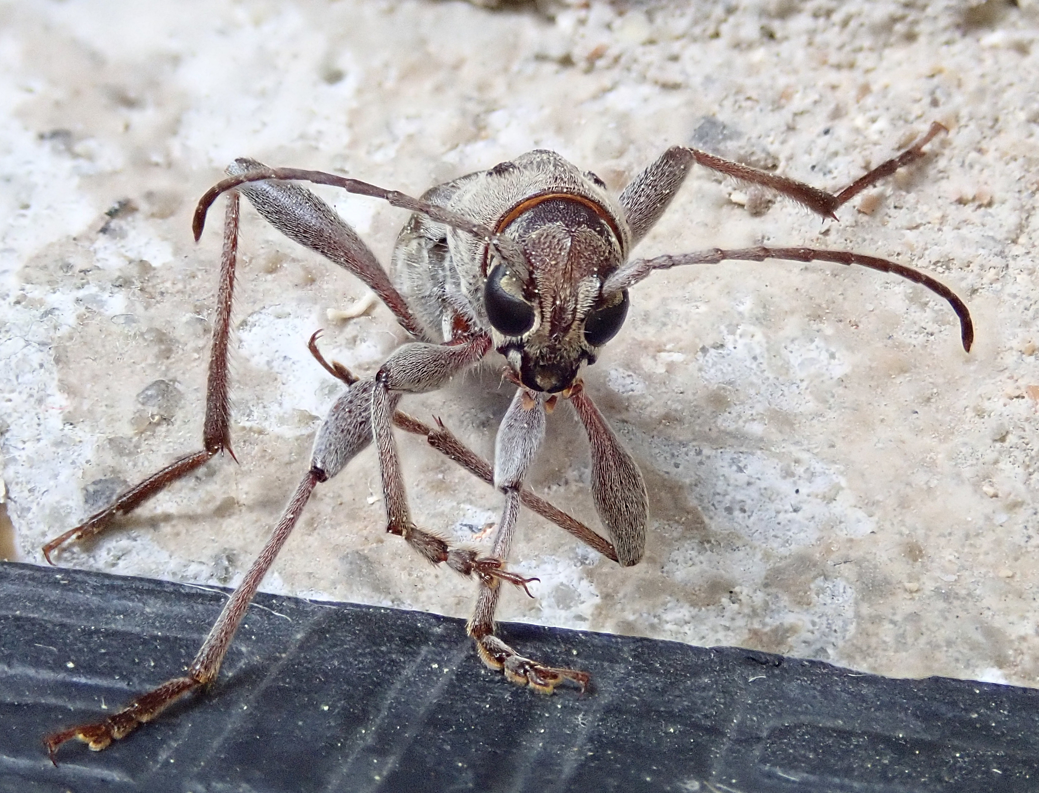 Xylotrechus stebbingi von Griechenland, Peloponnes, Vorderandsicht